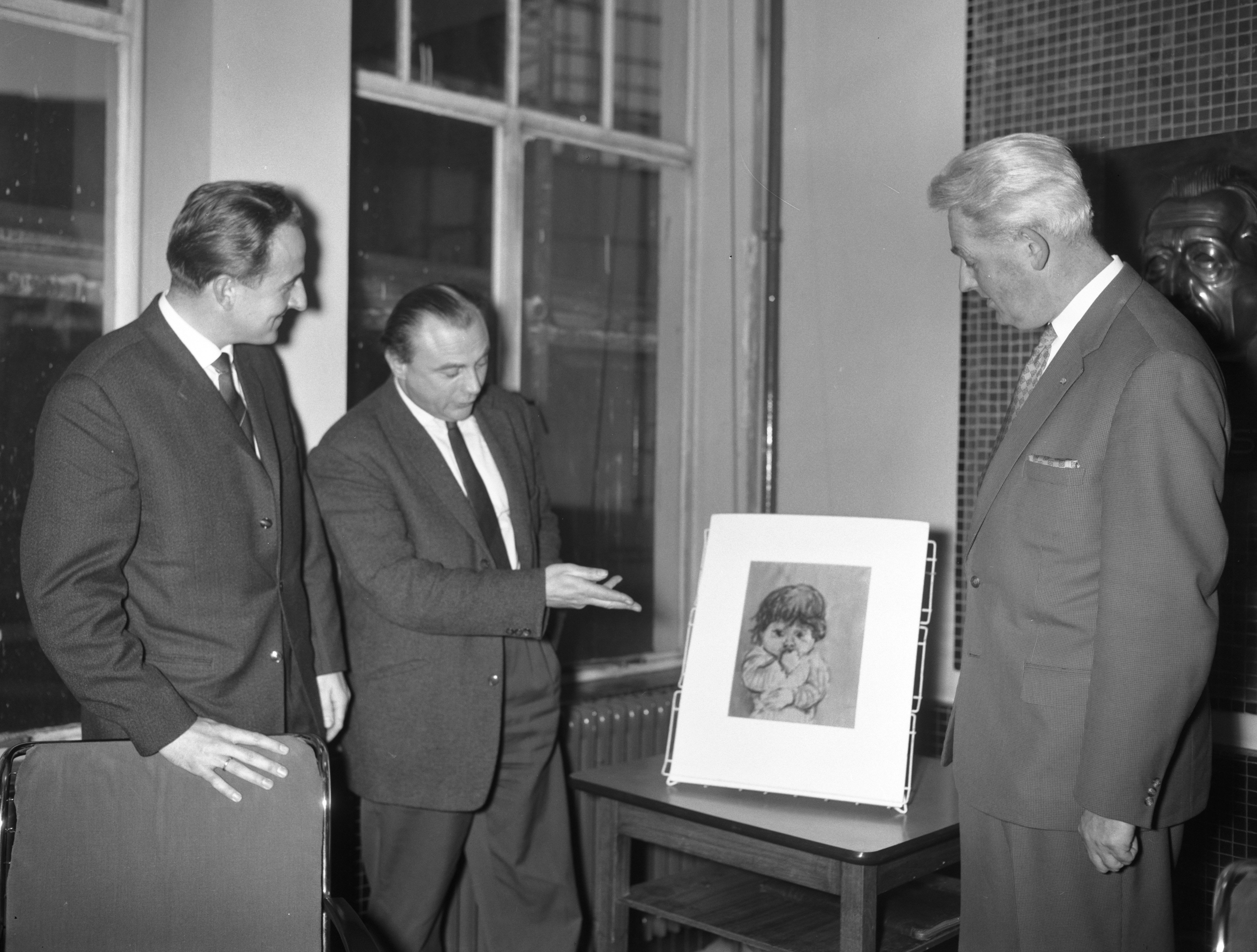 Uitreiking Roland Holstprijzen in het AP-gebouw; J.M. Stam, Bert Schierbeek, professor dr. Garmt Stuiveling.